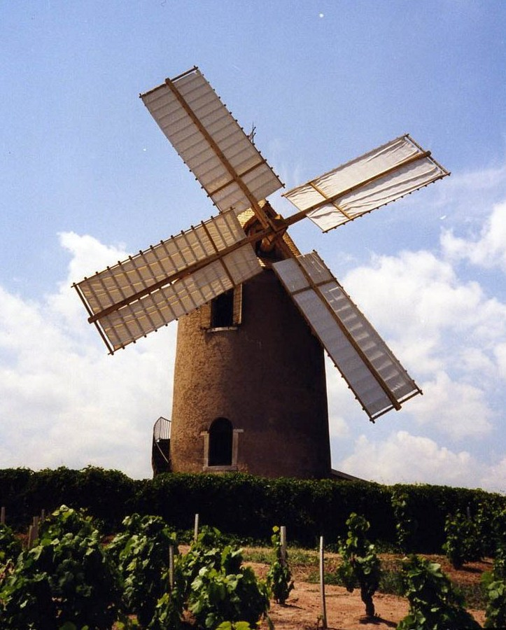 Moulin à vent à Romanèche-Thorin en 2004.